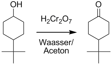 Bild gemolt mam programm Chemdraw op der ULP